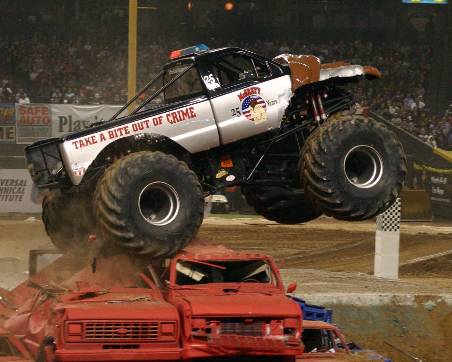 Taken by Jot Powers, 1/2006